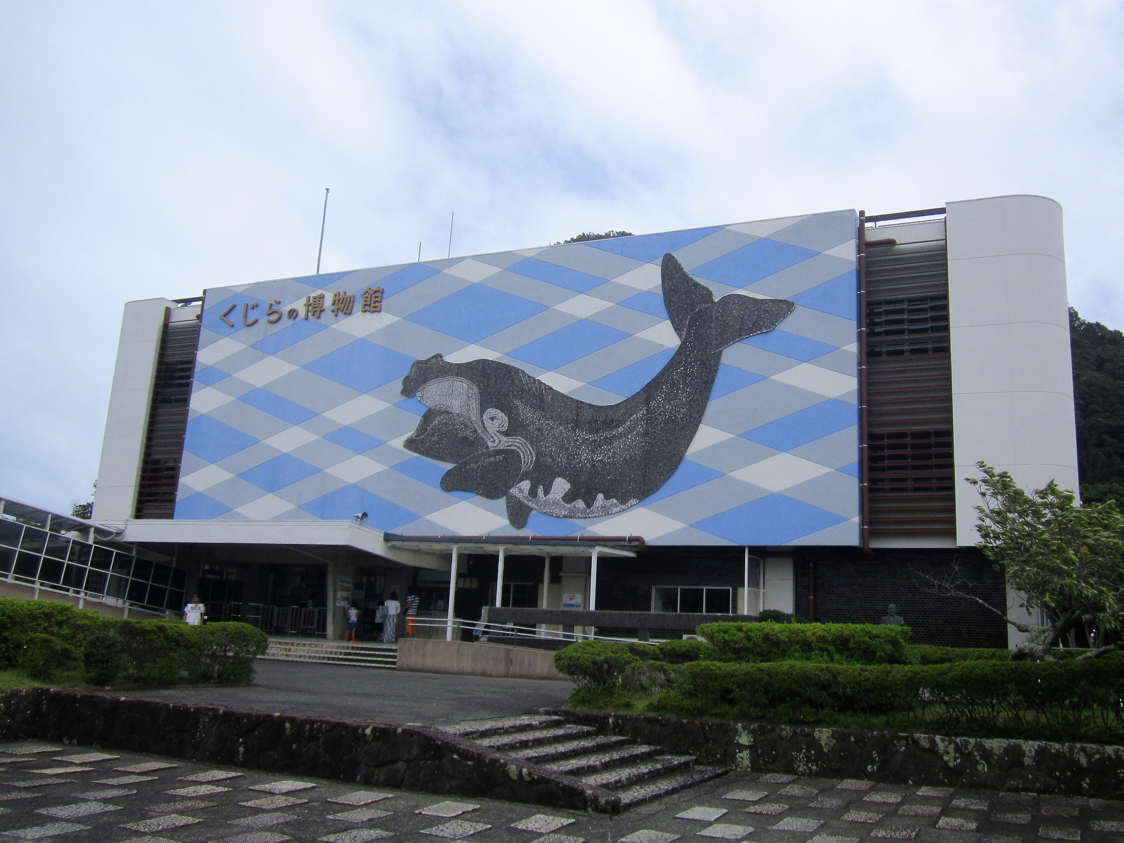 太地町立くじらの博物館